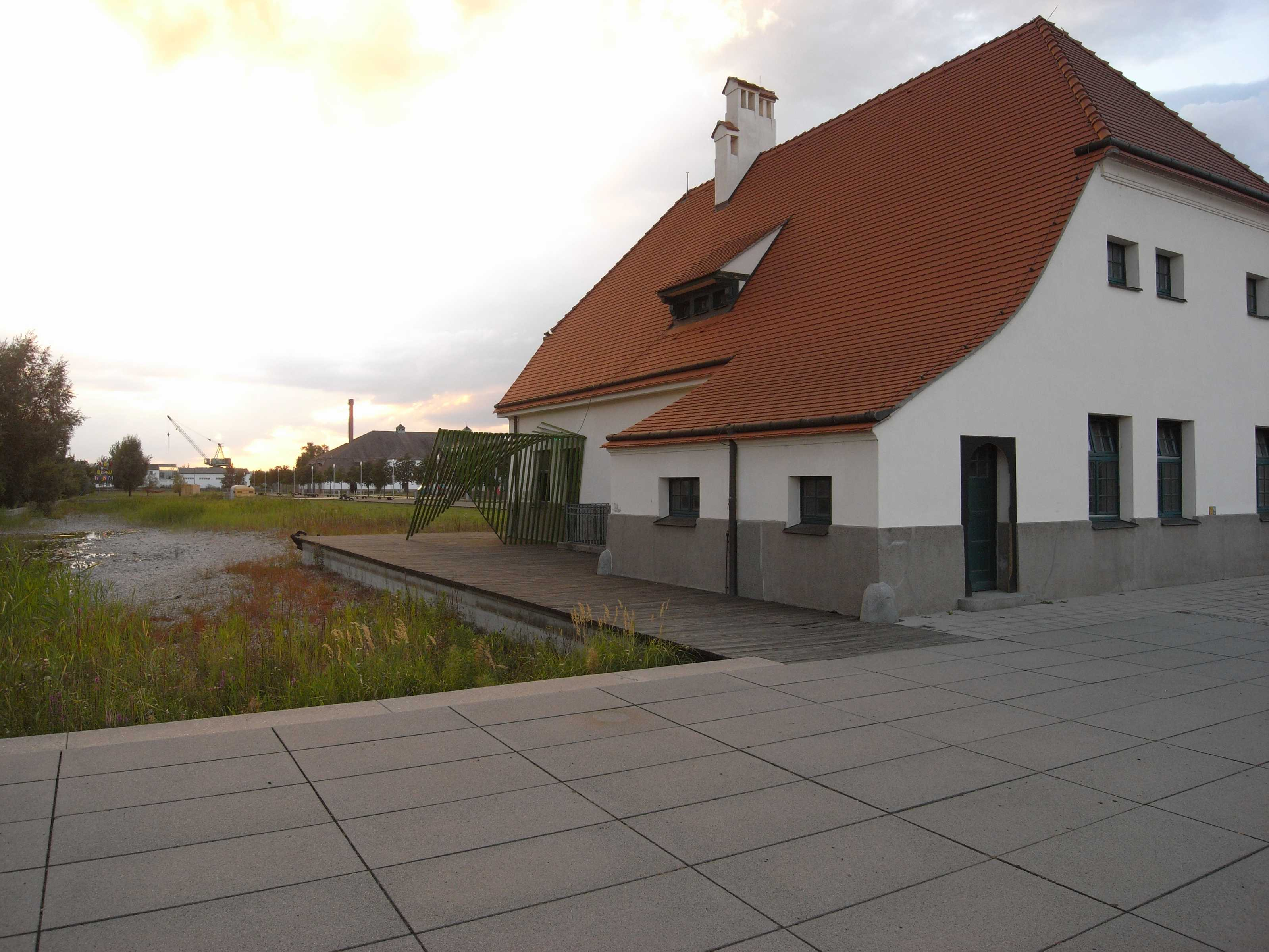 Messe Dresden im Großen Ostragehege, Wasseranlagen in den Freiflächen (Dresden, Sachsen, Deutschland)